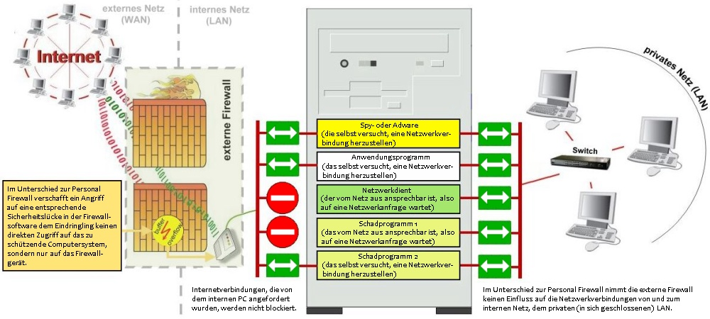 Externe Firewall - Heimbereich - Möglichkeiten und Grenzen